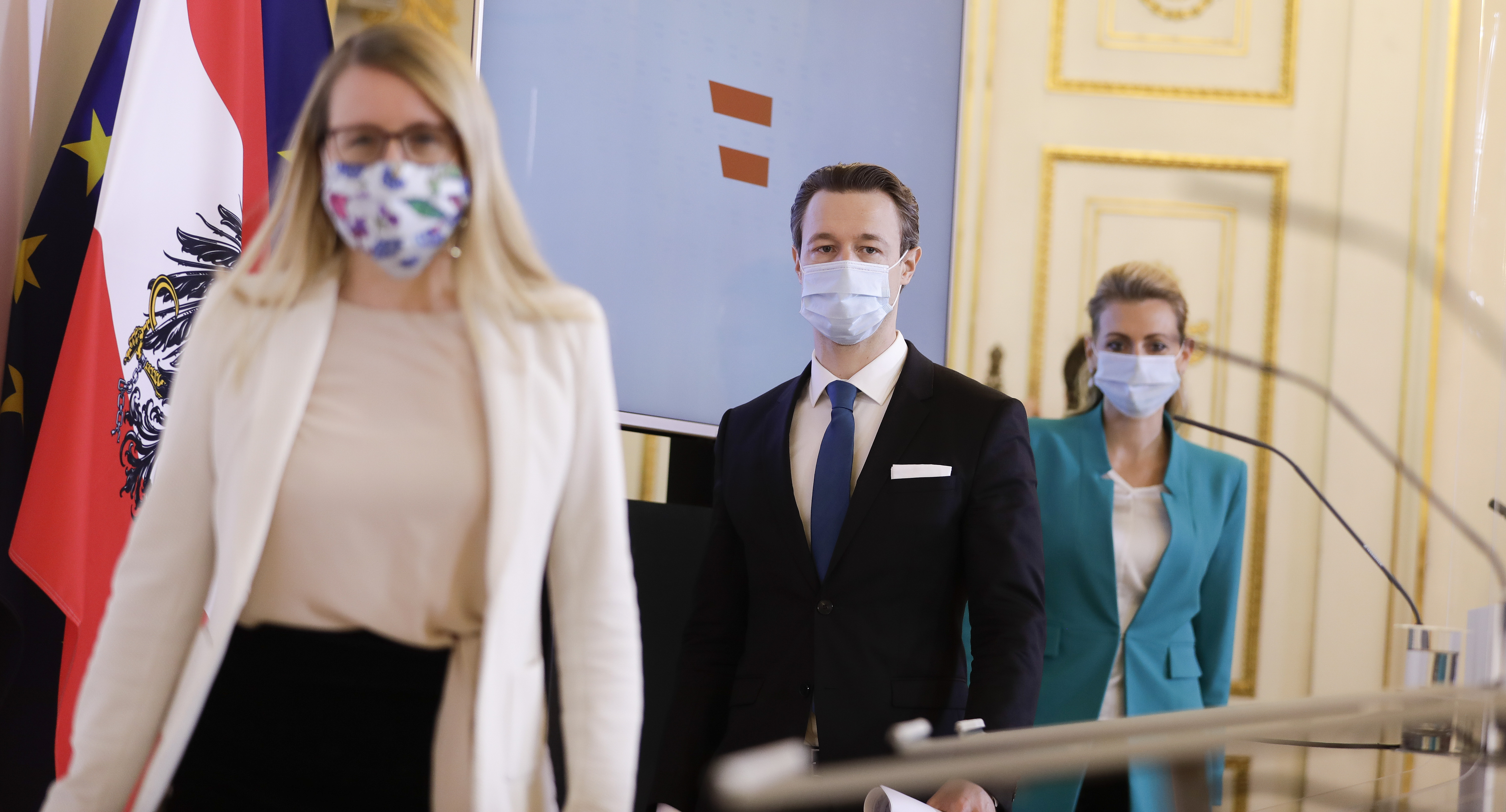 Fotocredit: BMF/Wenzel